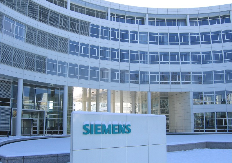 Siemens-Standort München St. Martinstr.